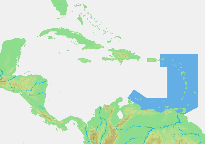 Caribbean - Lesser Antilles.PNG